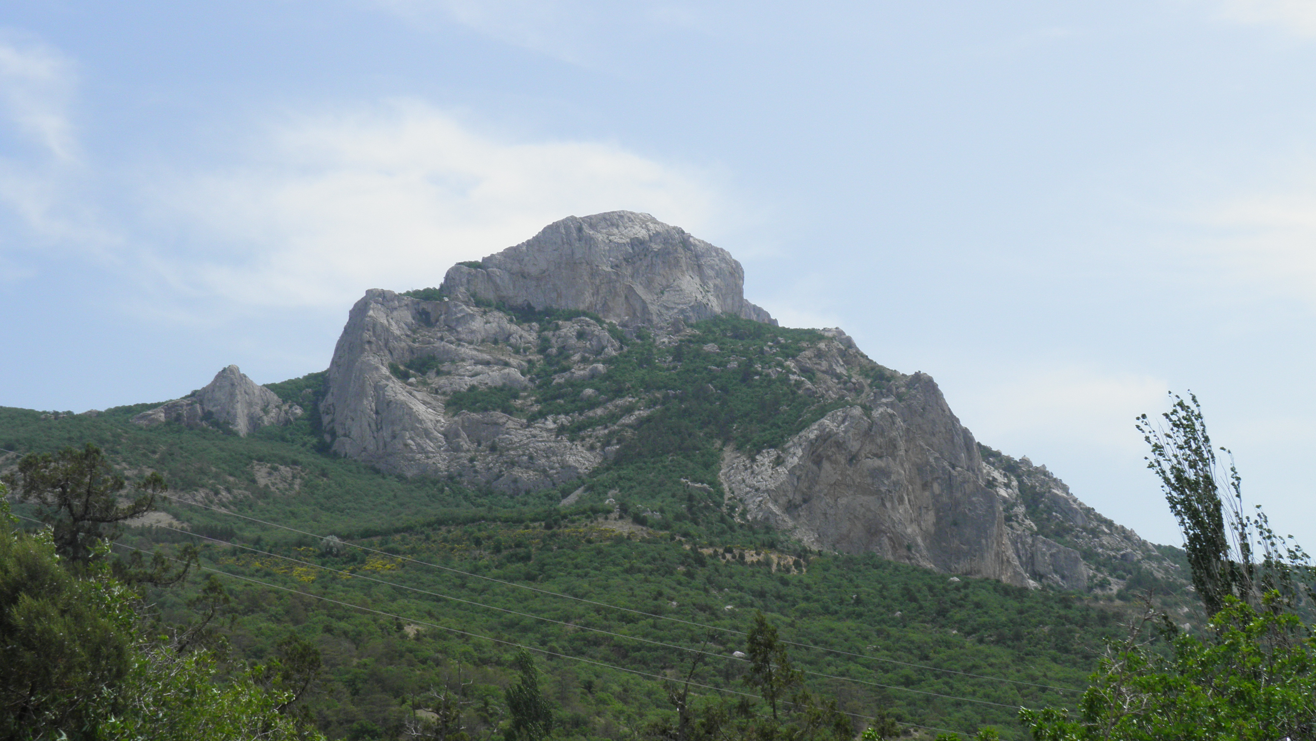 «Скелі Ласпі», Розташована у адміністративних межах м. Севастополя (Балаклавський район) південніше селищ Тилове та Орлине, на західному краю головної гряди Кримських гір (г. Каланих-Кая), у північній частині урочища Ласпі, на південний захід від Байдарської улоговини. Територія заповідного урочища «Скелі Ласпі» займає 12 квартал Орлинівського лісництва Севастопольського державного лісомисливського господарства. Орлинівське лісництво: всі виділи в межах кварталу 12.